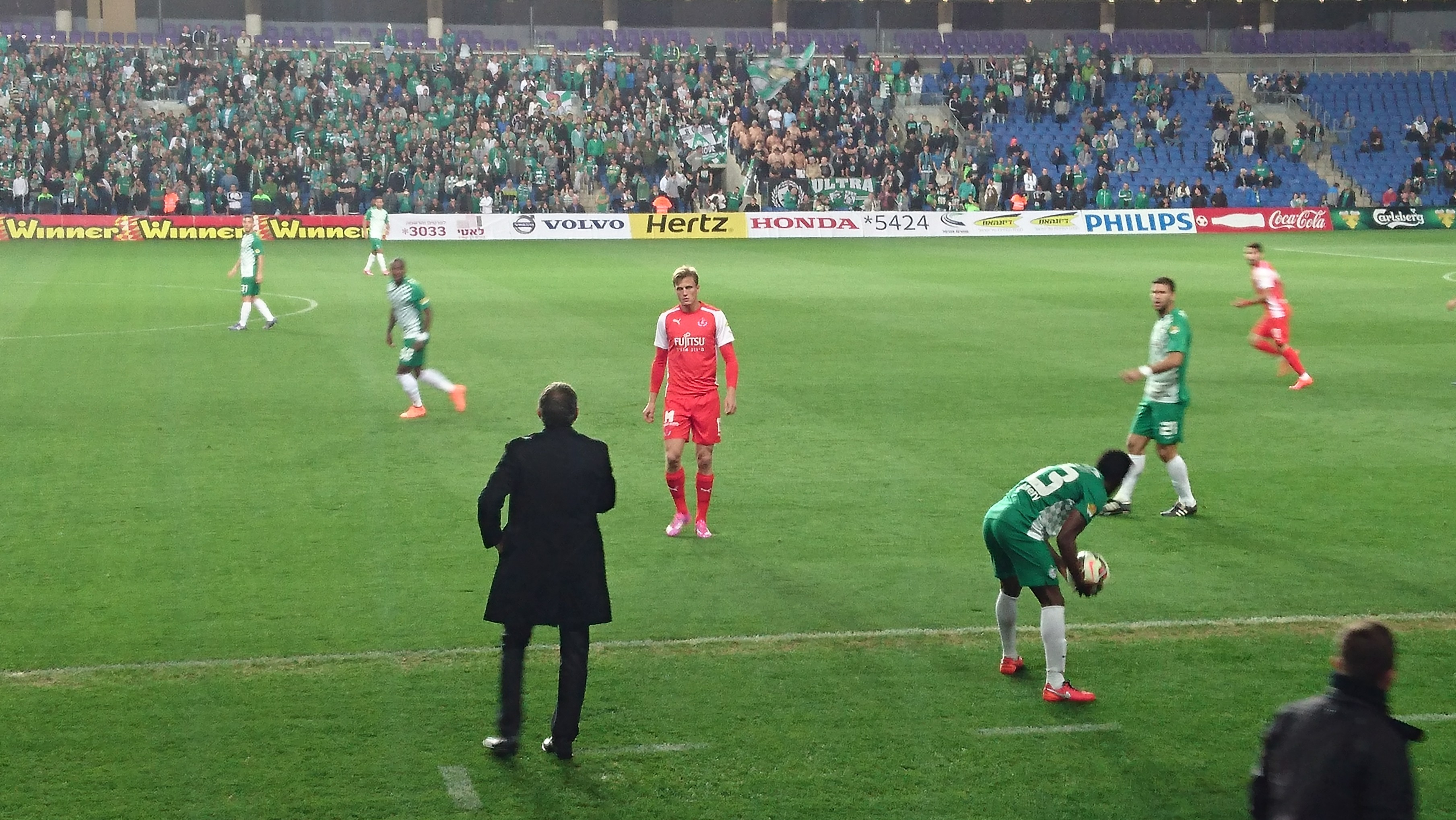 ארון שונפלד במידי הפועל ת"א